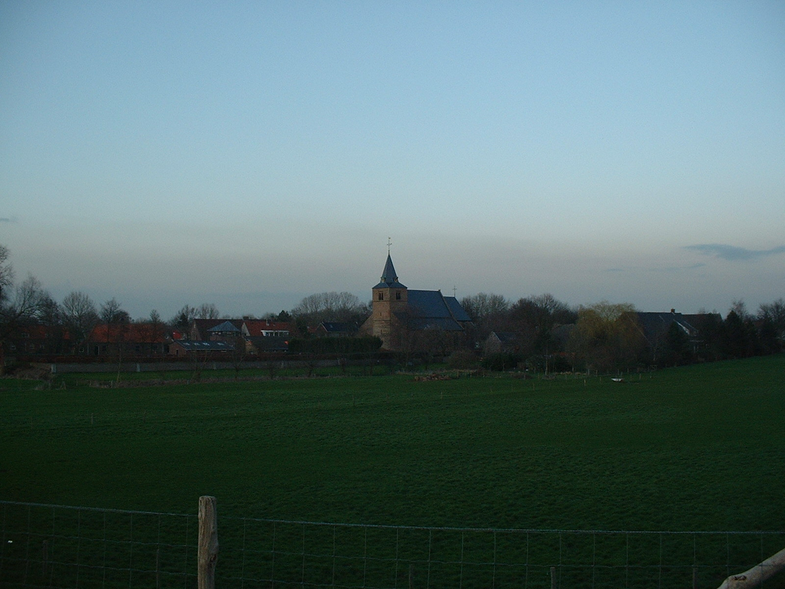 Church in Well, Gelderland, Netherlands